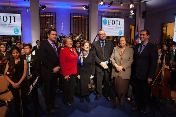 Presidenta asistió a la Gala del 13° Aniversario de la Fundación Orquestas Juveniles e Infantiles.